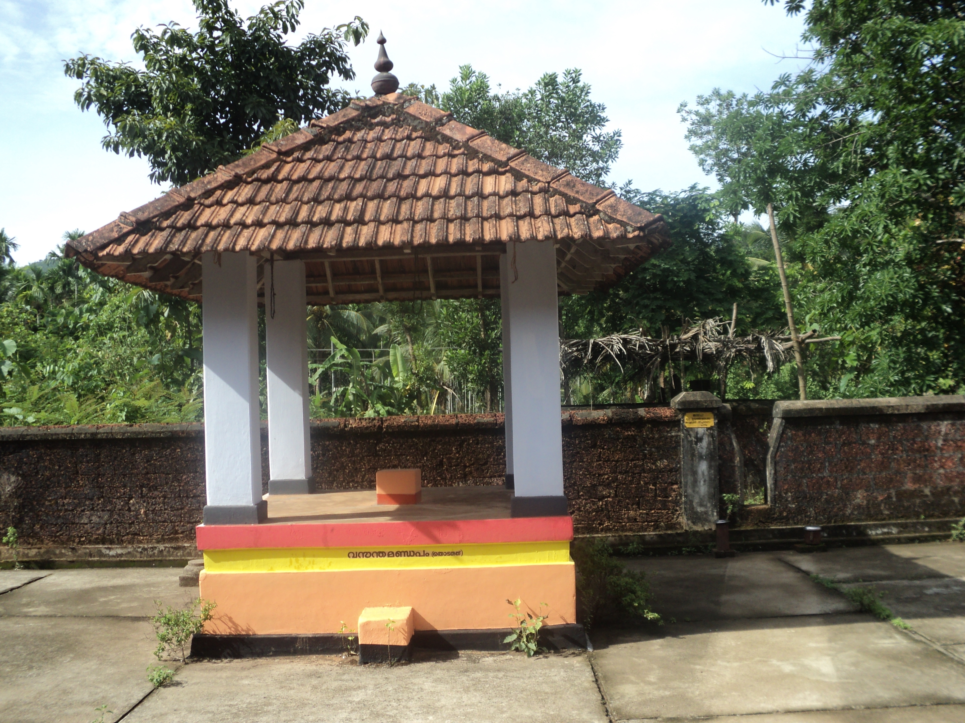 ക്ഷേത്രത്തിനുള്ളിലെ വസന്തമണ്ഡപം